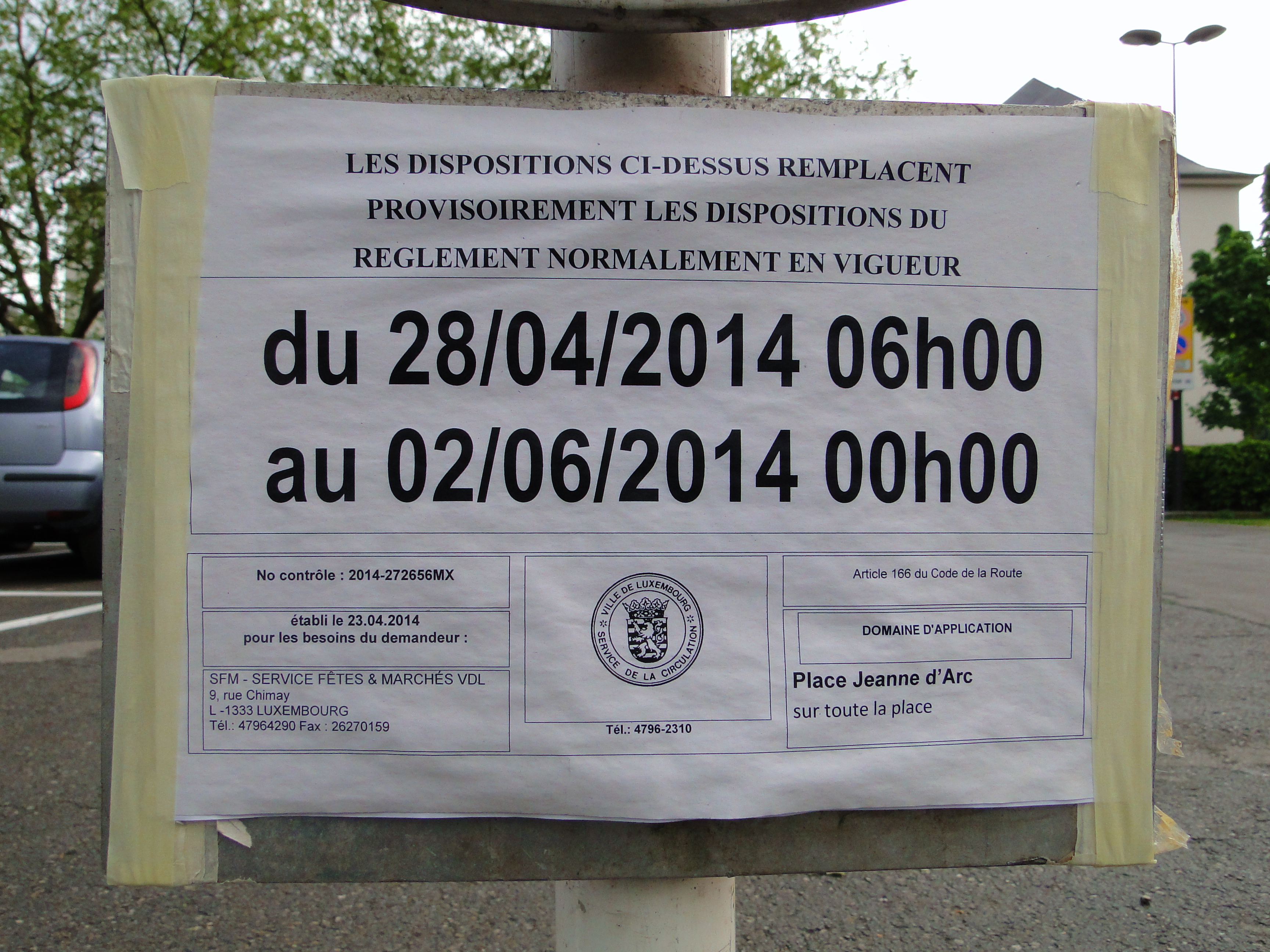 Zousazschëld Modell 5b (op Basis vum Artikel 166) aus dem Lëtzebuerger Code de la route